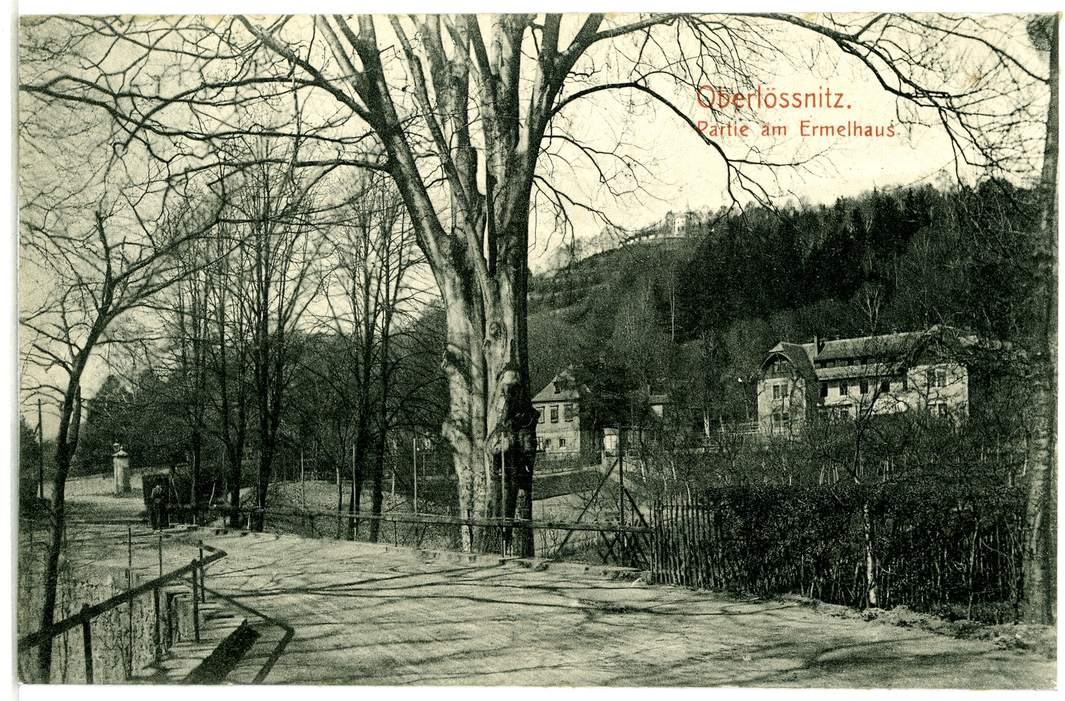 Oberlößnitz; am Ermelhaus This postcard is from publisher Brück & Sohn in Meißen ( postcard has a unique number 04184 and is available in a higher resolution at the publisher. This images was uploaded in a cooperation project between Wikipedians and the publisher.